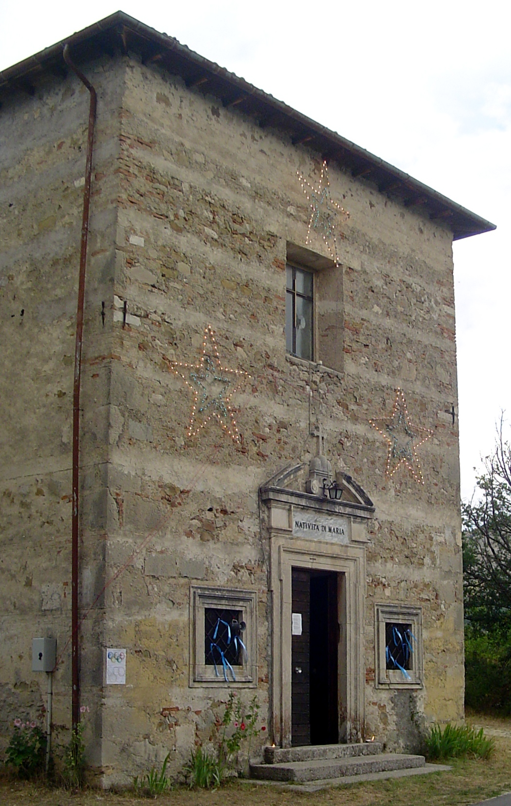 Chiesa della Natività di Maria, Collemare di Sassa, frazione de L'Aquila